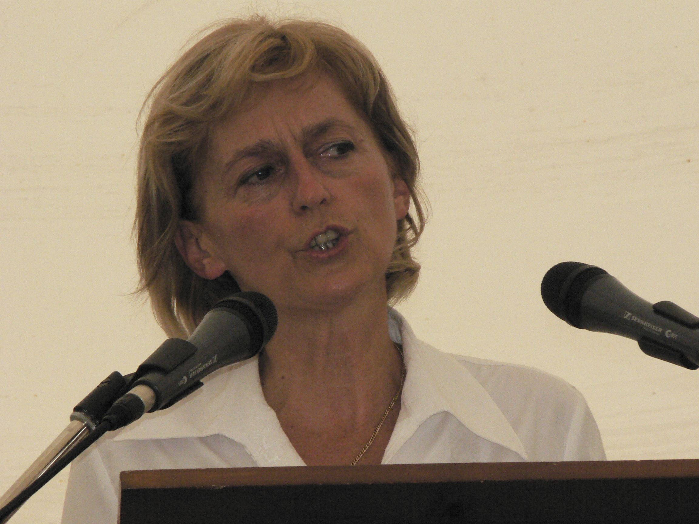 A Magyar Demokrata Fórum 2006 június 24 -én Somló hegyen tartotta összejövetelét. 15 évvel ezelőtt Antall József kormányfő itt jelentette be az orosz csapatok kivonását Magyarországról. A kép korábban Creative Commons alatt megjelent a Metapolisz 2 DVD -n (ISBN: 963-06-0412-4)